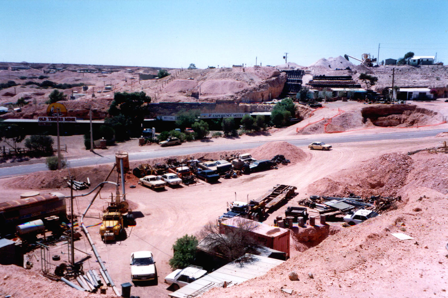 Coober Pedy vanaf de Big Winch